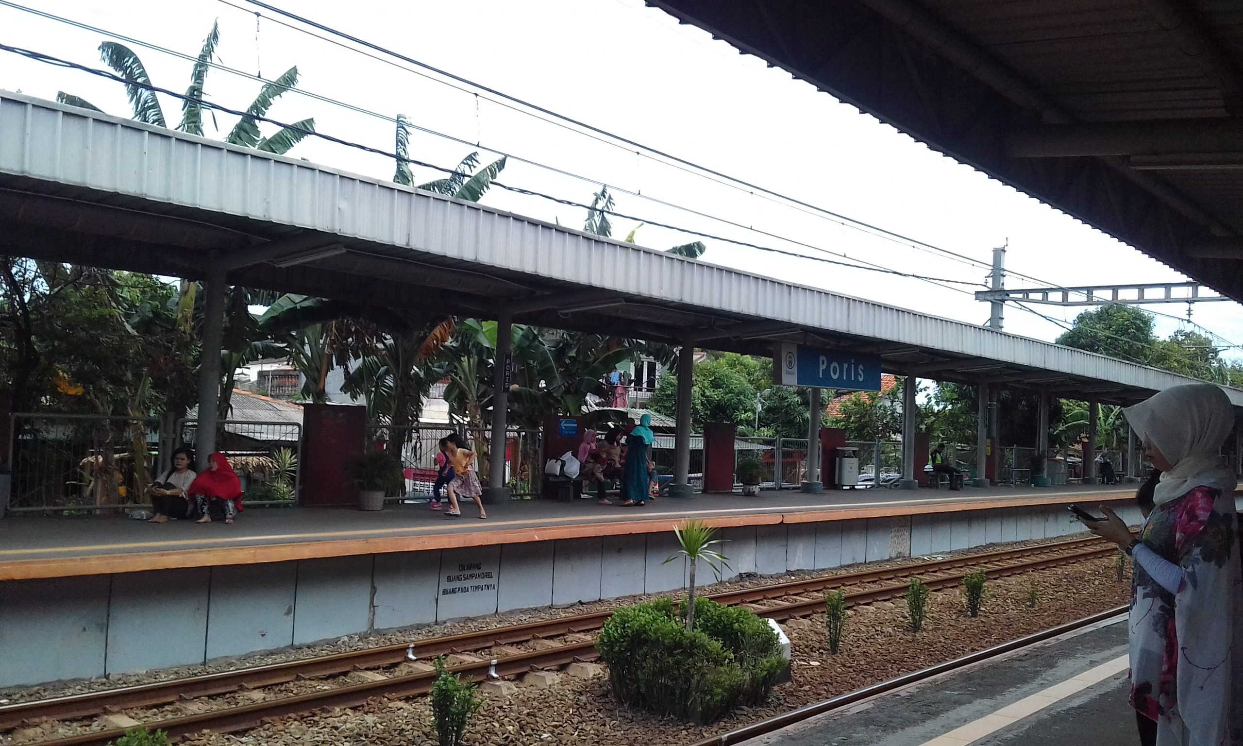 Peron Stasiun Poris pada 6 Januari 2018.